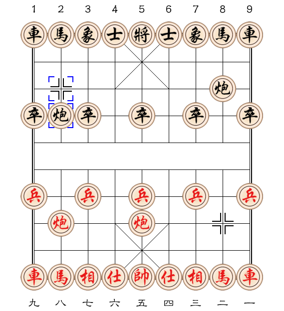 Hữu điệp